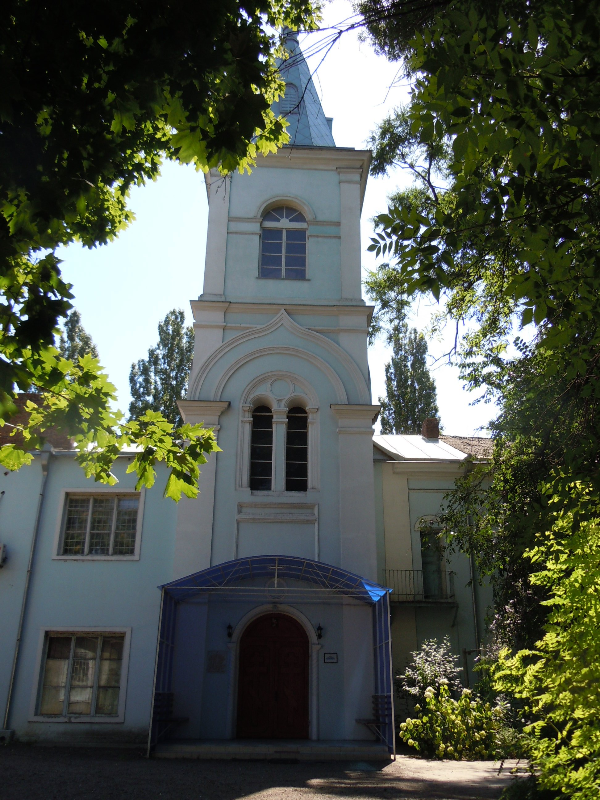 Церква Благовіщення при сирітському притулку, Одеса